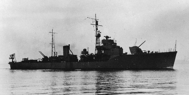 日本海軍 御蔵型海防艦「御蔵」、横浜市鶴見沖